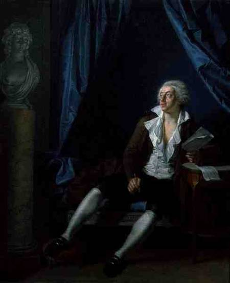 Charles-Albert Demoustier